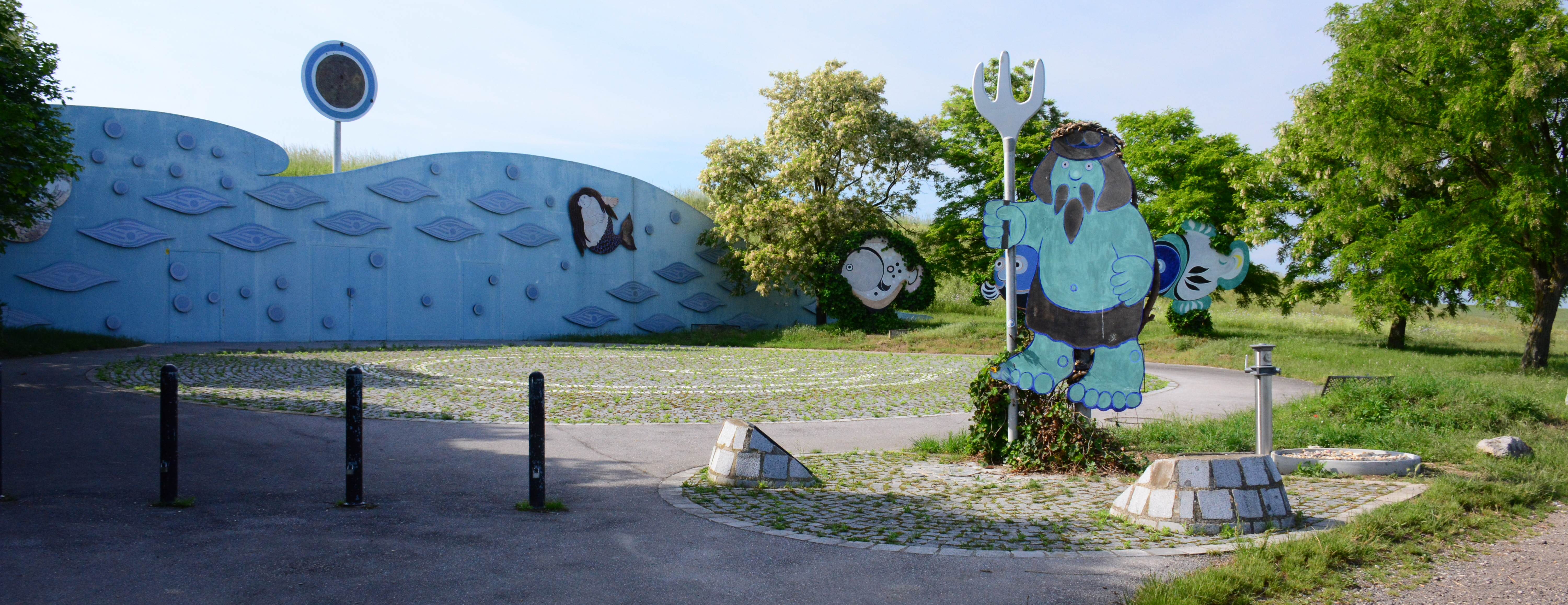 Die künstlerische Gestaltung des Wasserbehälters Bisamberg stammt von Professor Gottfried Kumpf